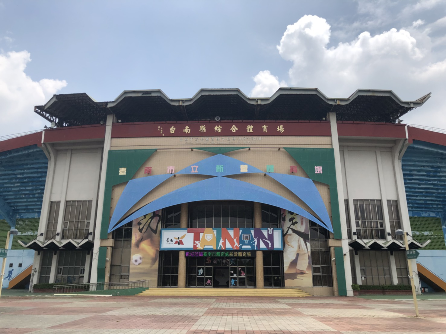 中文（台灣）: 新營體育場田徑場